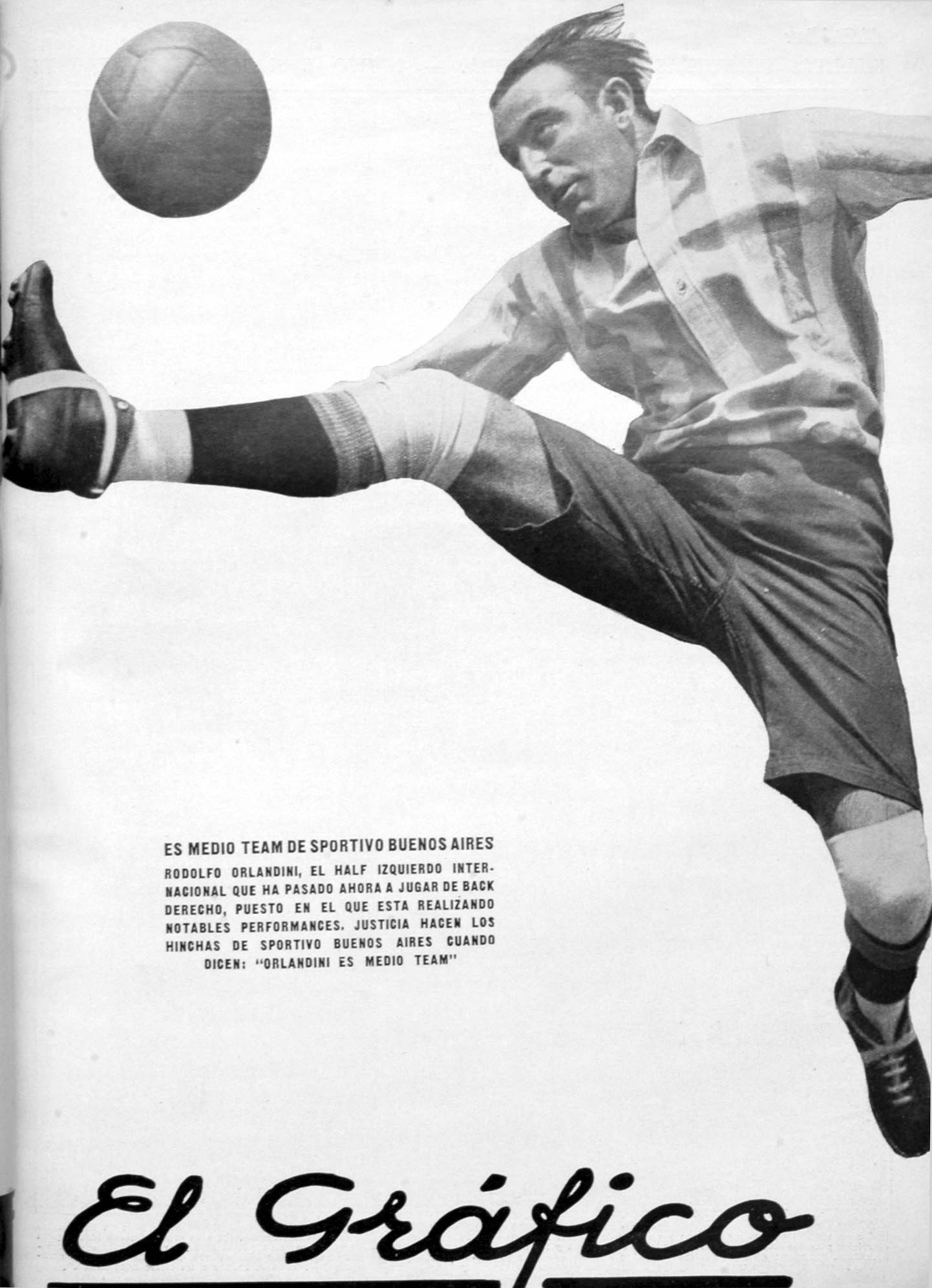 El Grafico del 13 de Diciembre de 1930. Edicion 596